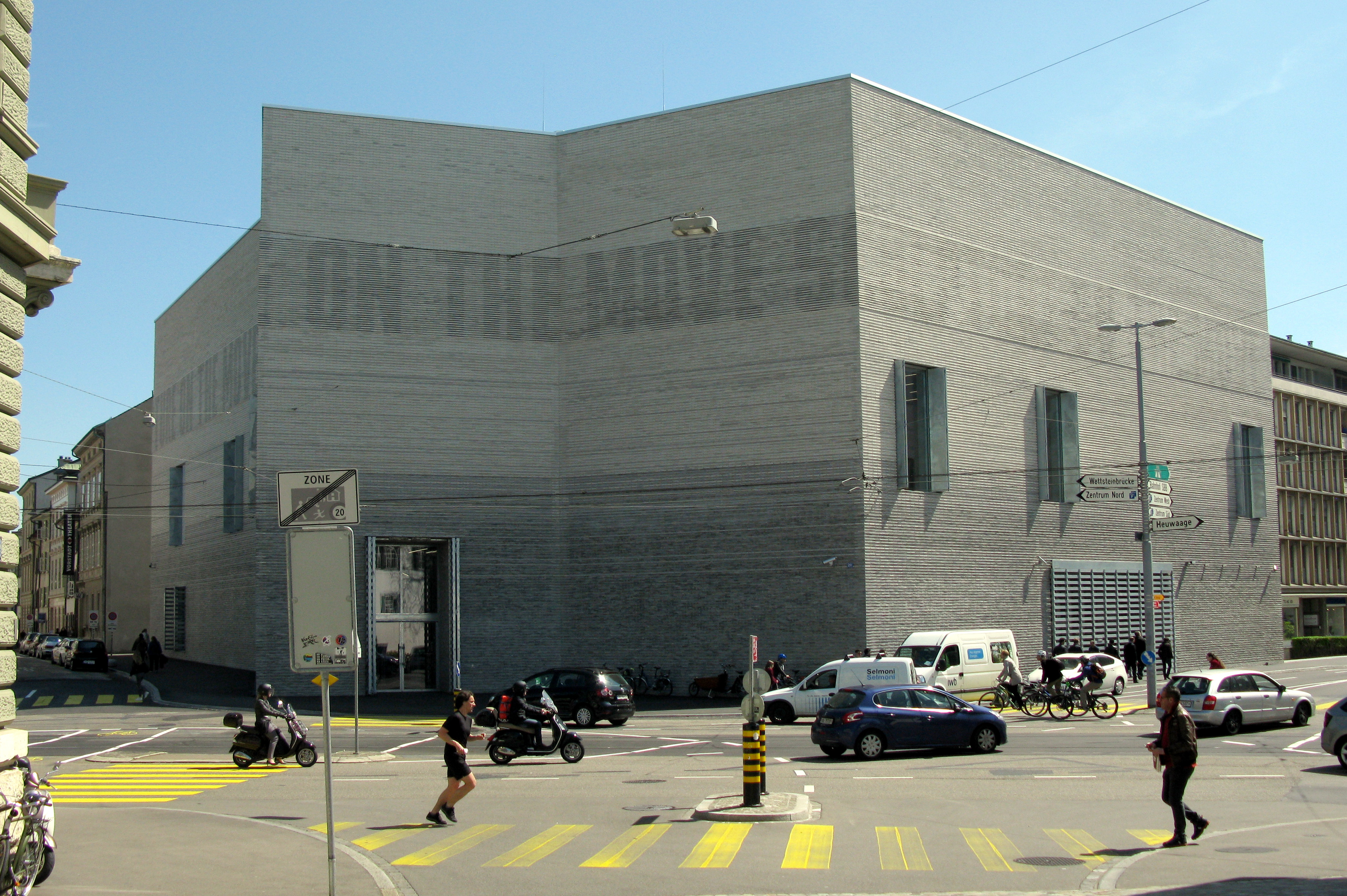 Neubau des Kunstmuseums in Basel von der Rittergasse gesehen